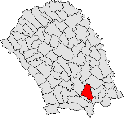 Categorie:Hărţi ale judeţului Botoşani